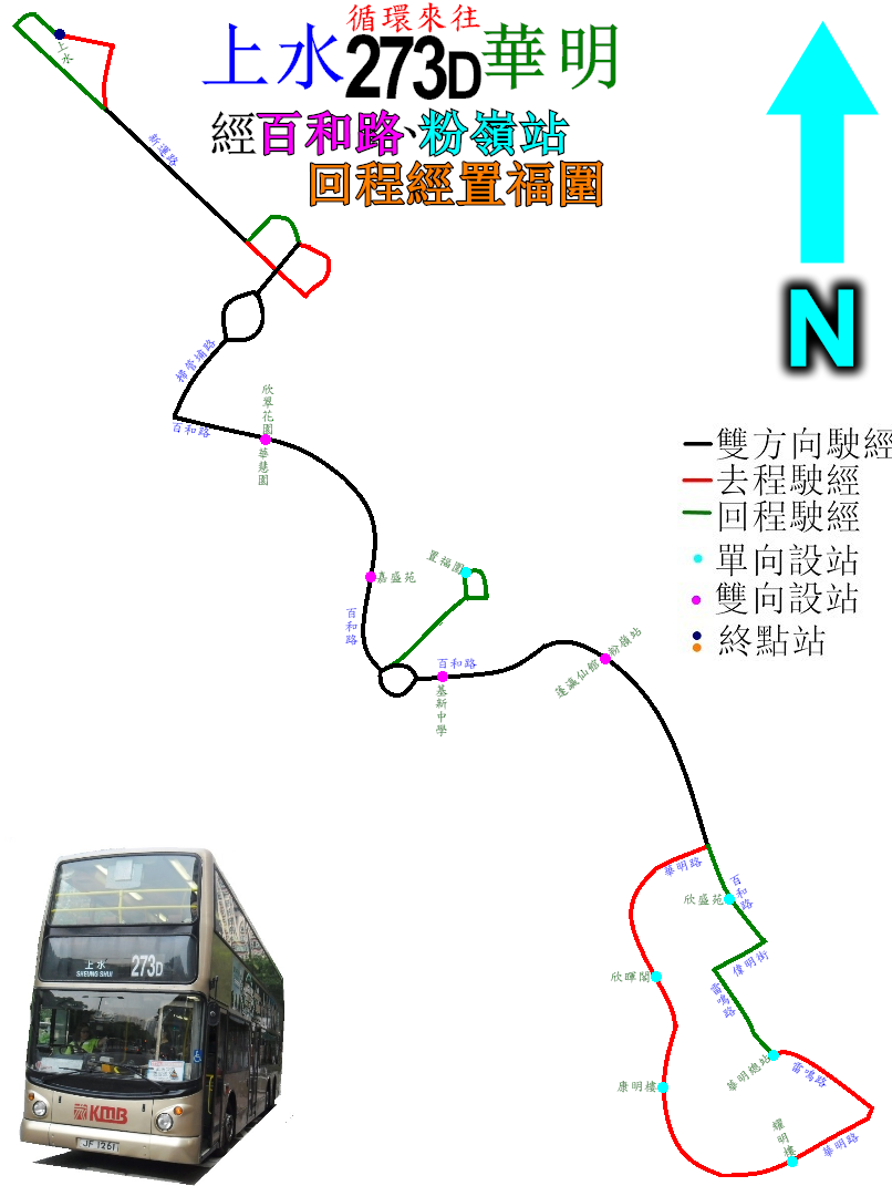 中文（香港）: 九巴273D線的走線圖